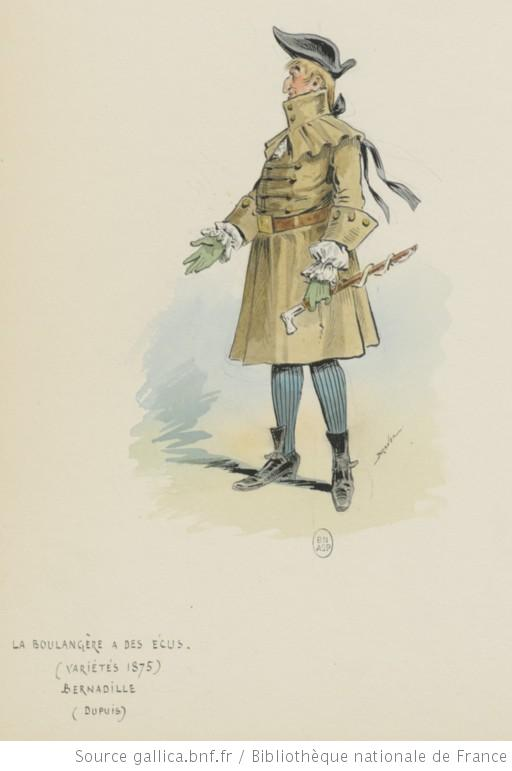 La boulangère a des écus, opéra-bouffe de Meilhac, Halévy et Offenbach : Dupuis (Bernadille) : dessin de Draner